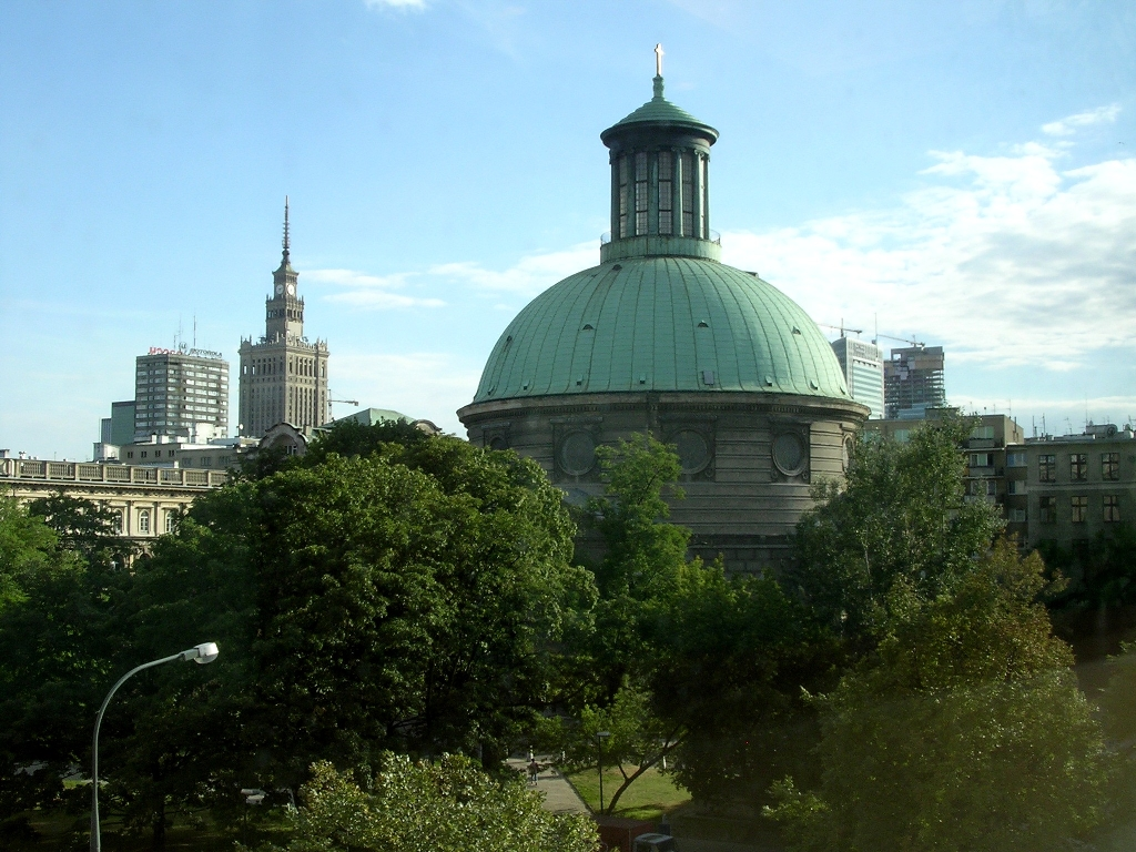 Den evangeliske kirken.